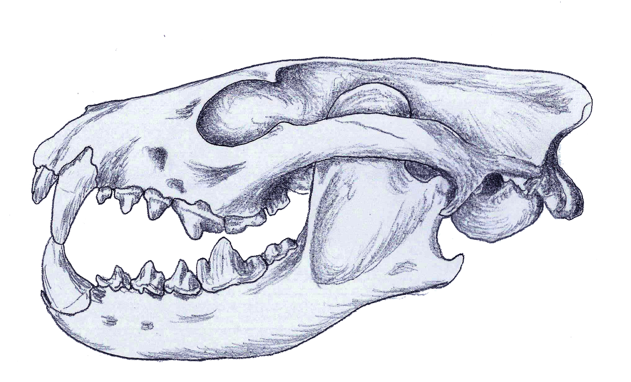 Skull of Sunkahetanka